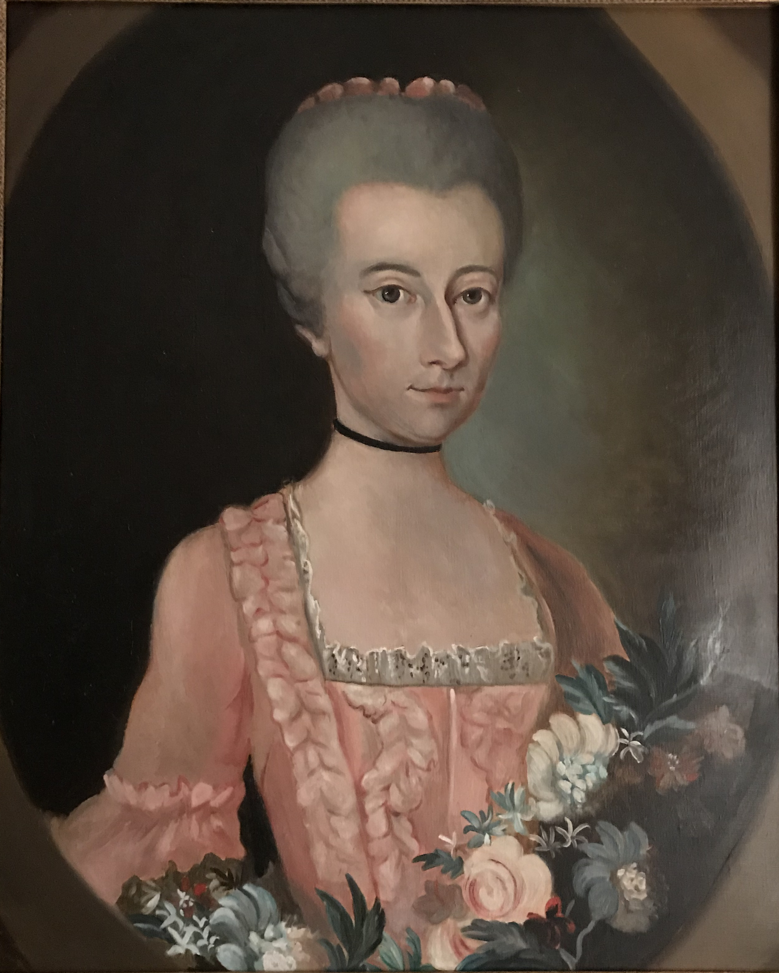 Ce portrait représente la jeune Louise-Adelaïde de Meinières, fille de Jean-Baptiste-François Durey de Meinières, président au Parlement de Paris. Elle épouse en juin 1758 Charles-Guillaume de Pechpeyrou-Comminges, comte de Guitaut.